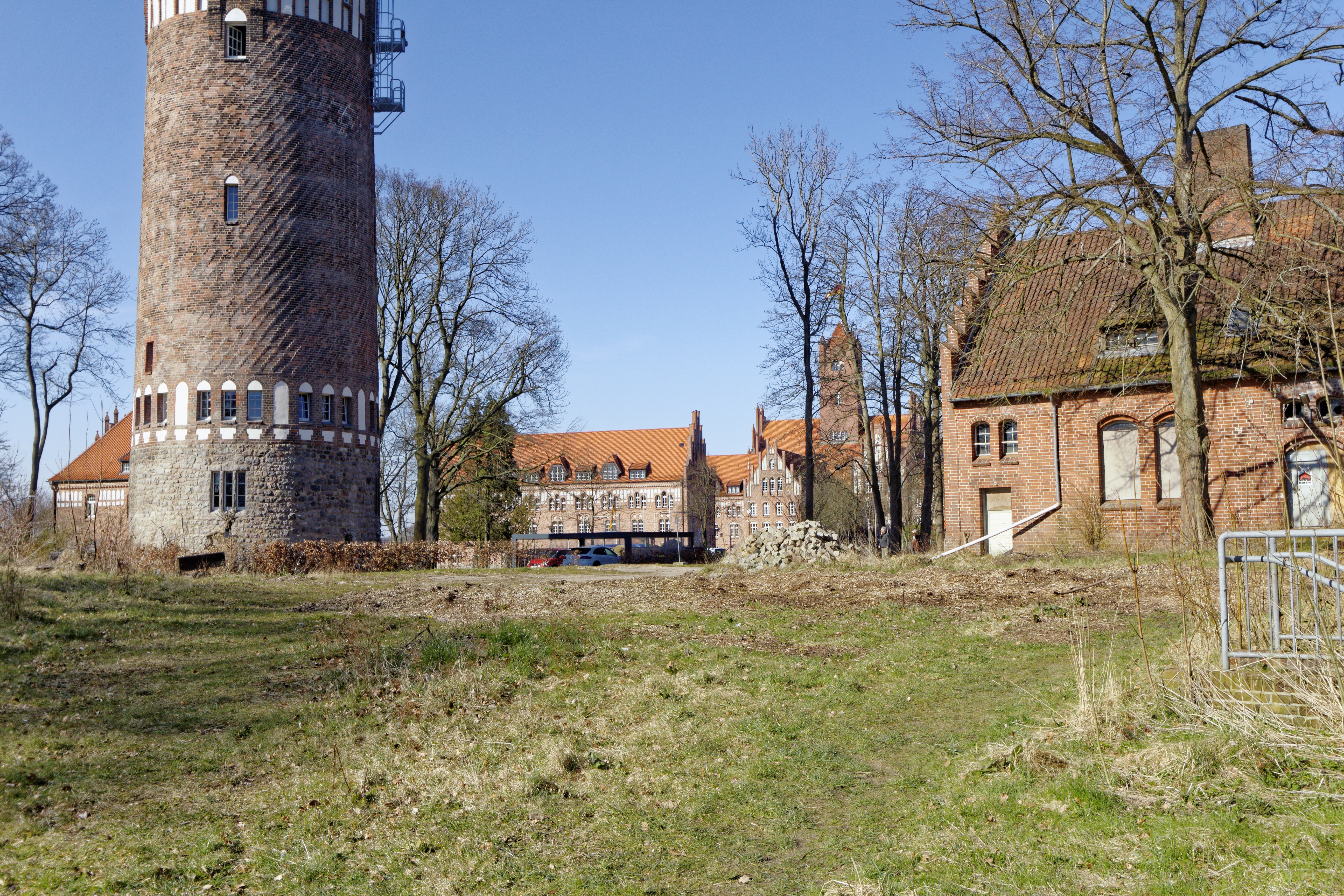 Flensburg, Marineschule Mürwick